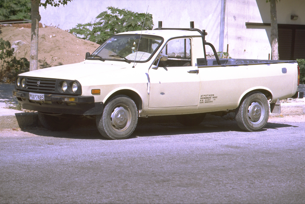 Dacia 1304 Pick-Up. Pickupversion des in Rumänien in Lizenz gebauten Renault R12. Ist hauptsächlich in südeuropäische Länder exportiert worden. 1991